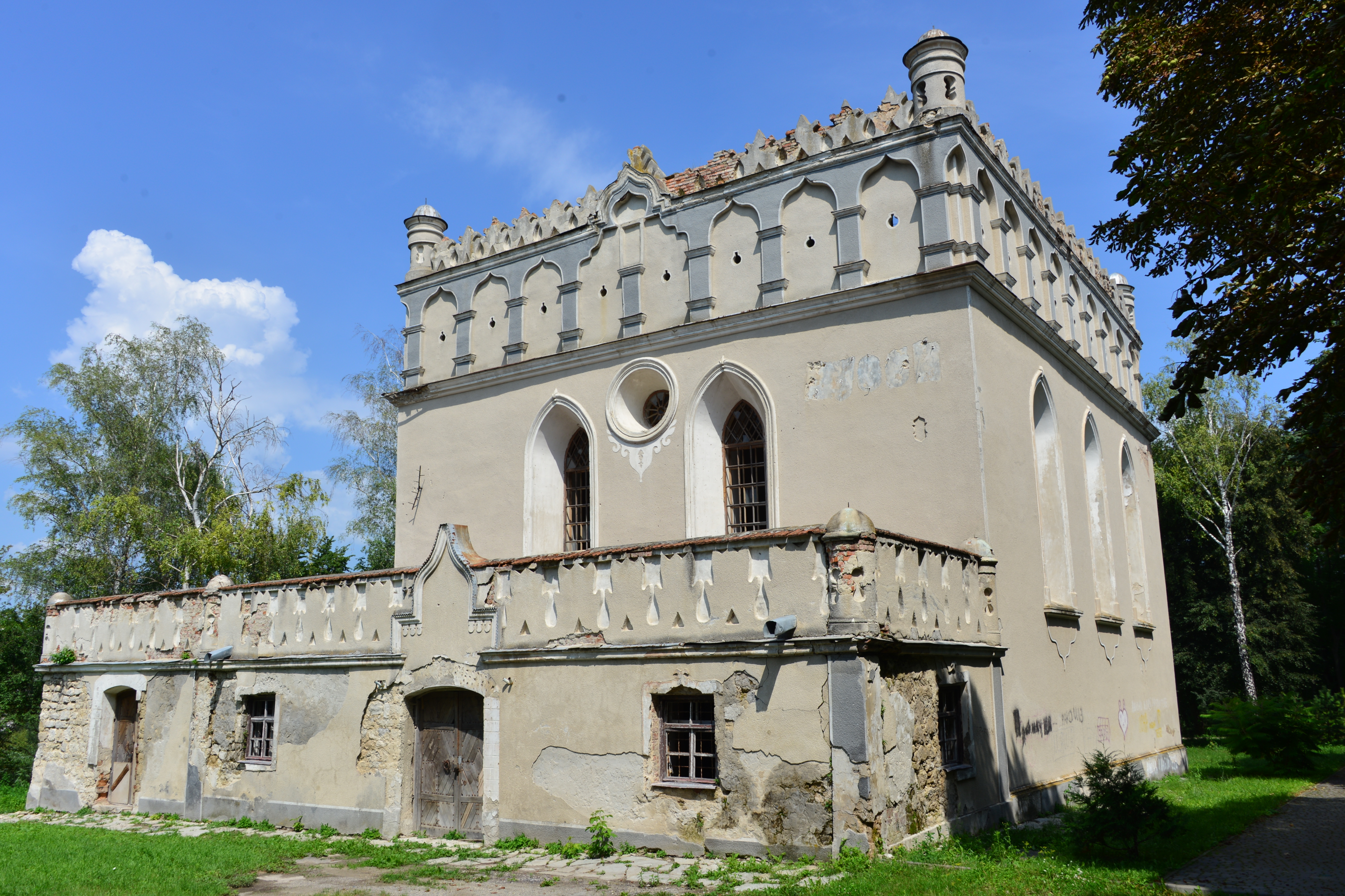 Синагога, Гусятин, вул. Пушкіна, 15